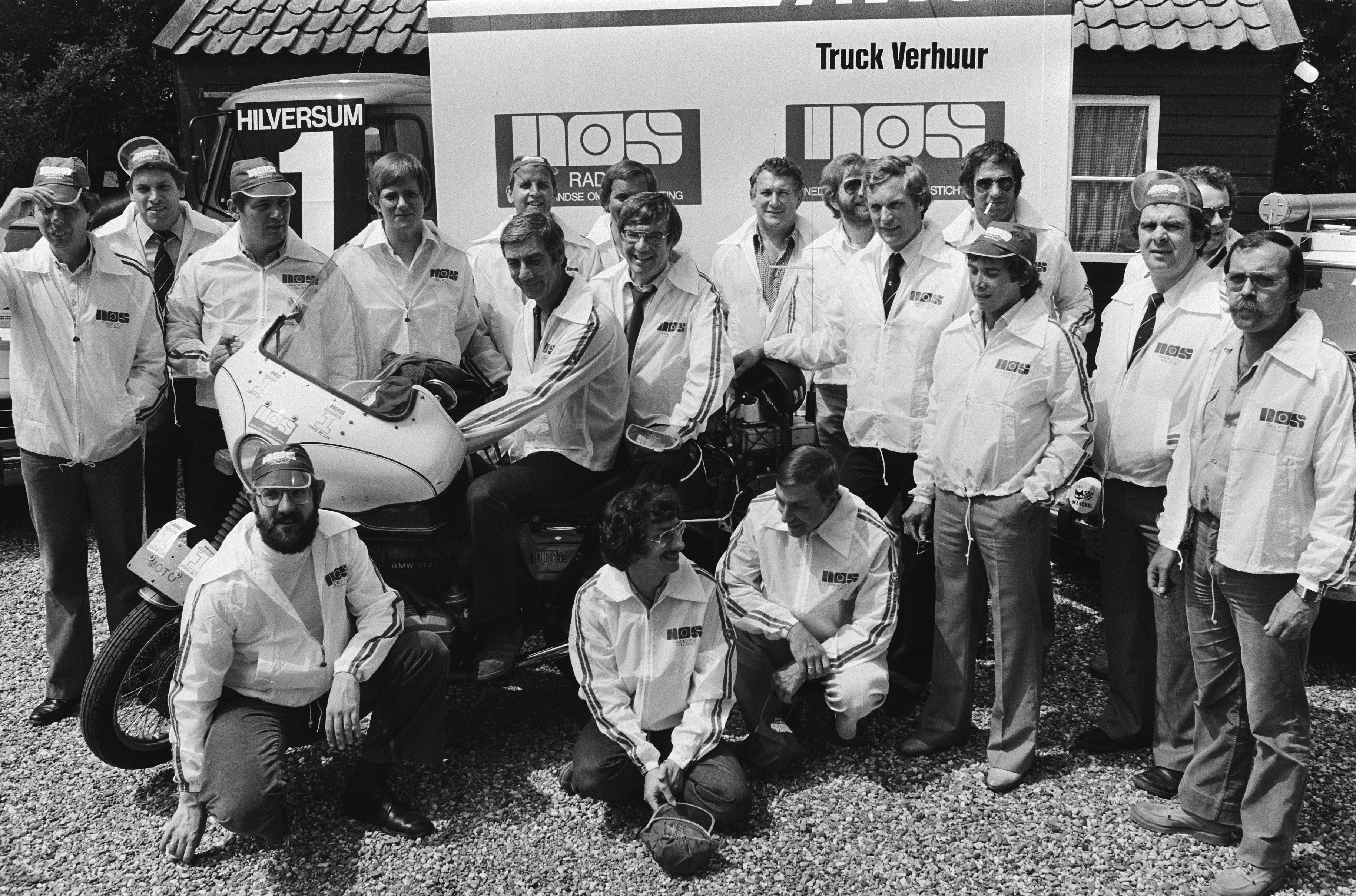 Presentatie van de NOS equipe voor de Tour de France 1979 Groepsfoto van de gehele equipe. 19 juni 1979. Hilversum, Noord-Holland. Achterste rij van links naar rechts: 1. ... 2. ... 3. ... 4. Klaas Samplonius 5. .... 6. ... 7. Koos Postema 8. ... 9. ... 10. .. 11. ... 12. ... 13. ... 14. .. Midden (op de motor): 1. ... 2. Theo Koomen Voor (geknield): 1. Hans Prakke 2. .. 3. Heinze Bakker